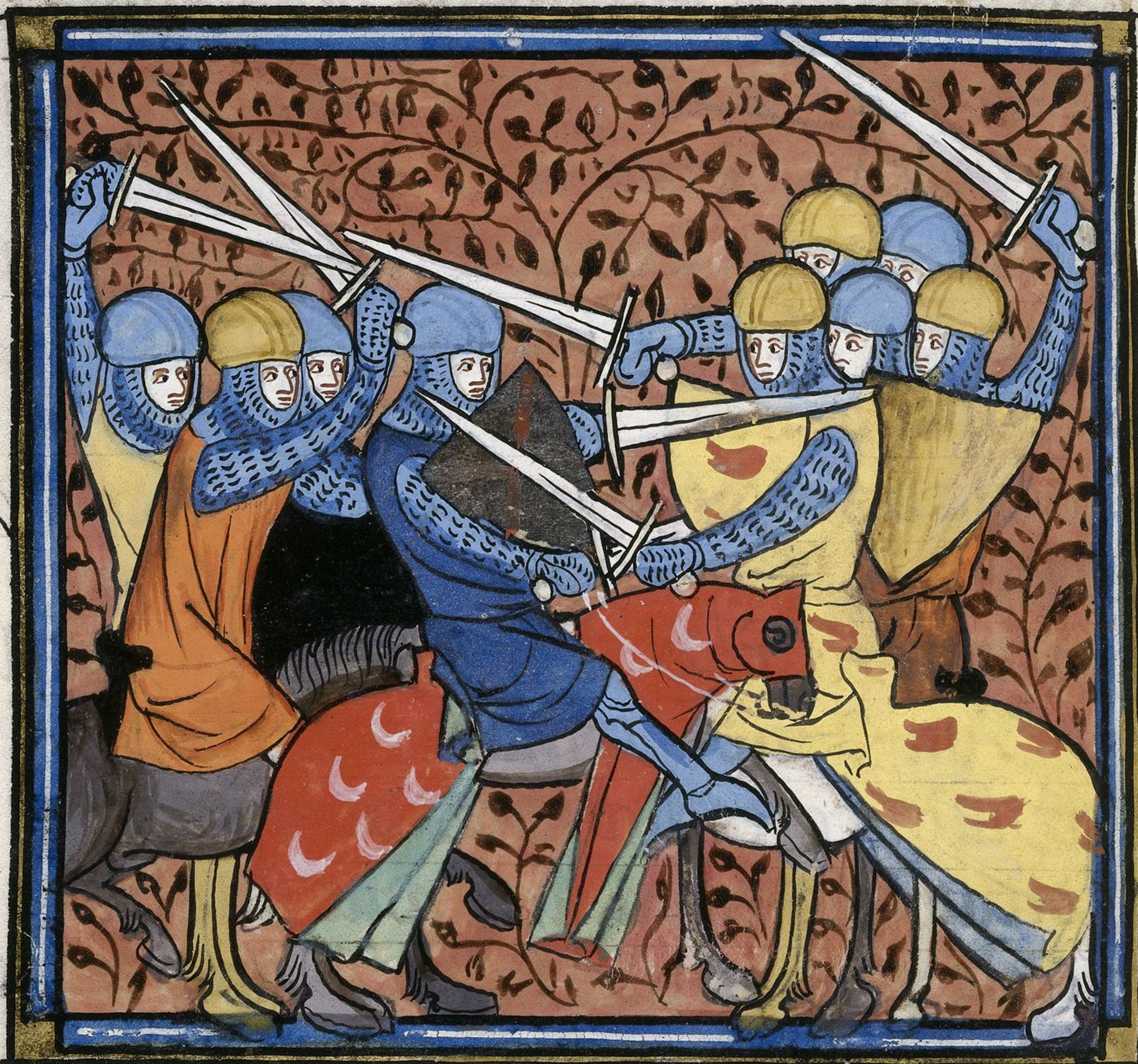 Ebroin defeating the Austrasians, from Les Grandes chroniques de France, Royal 16 G VI f.114v, c. 1332-1350